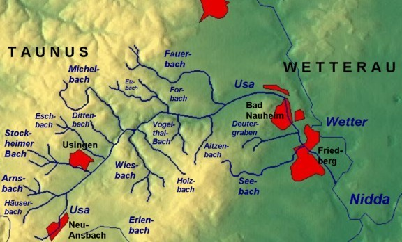 Flusssystem Usa